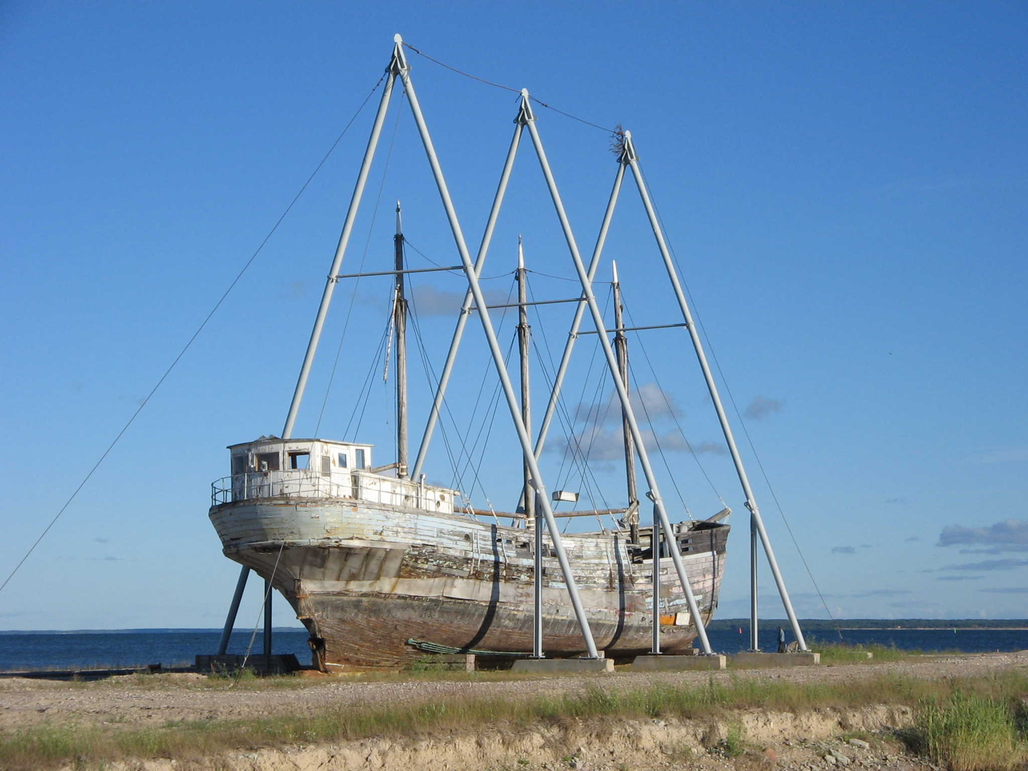 Ernst Jaaksoni nimeline purjelaev ehk purjekas Alar